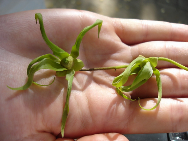 Description: Cananga odorata, novembre 2004, Jardin d'Eden, La Réunion Source:Bouba